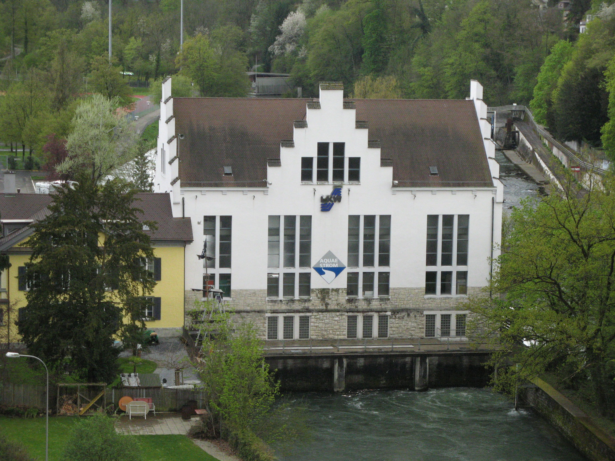 Wasserkraftwerk Aue in Baden, von der Hochbrücke aus gesehen